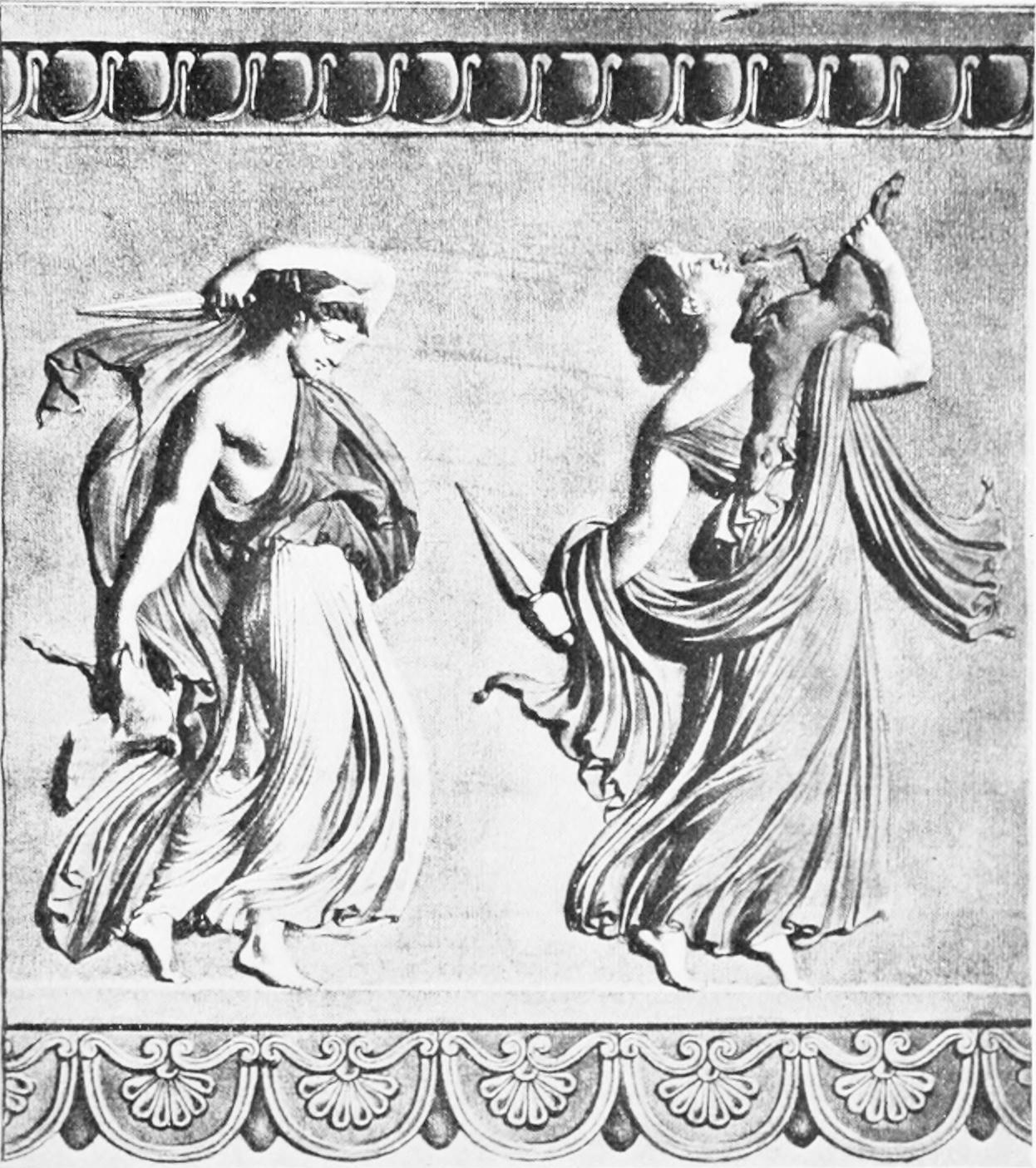 Maenads in a Dionysiac frenzy